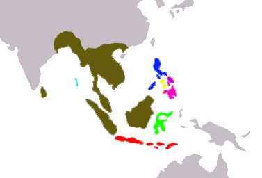 Verbreitung von Varanus salvator. Braun = Varanus salvator salvator; Hellblau = V. s. andamensis; Grün = V. s. togianus; Dunkelblau = V. s. marmoratus; Gelb = V. s. nuchalis; Violett = V. s. cumnigi; Rot = V. s. bivittatus.